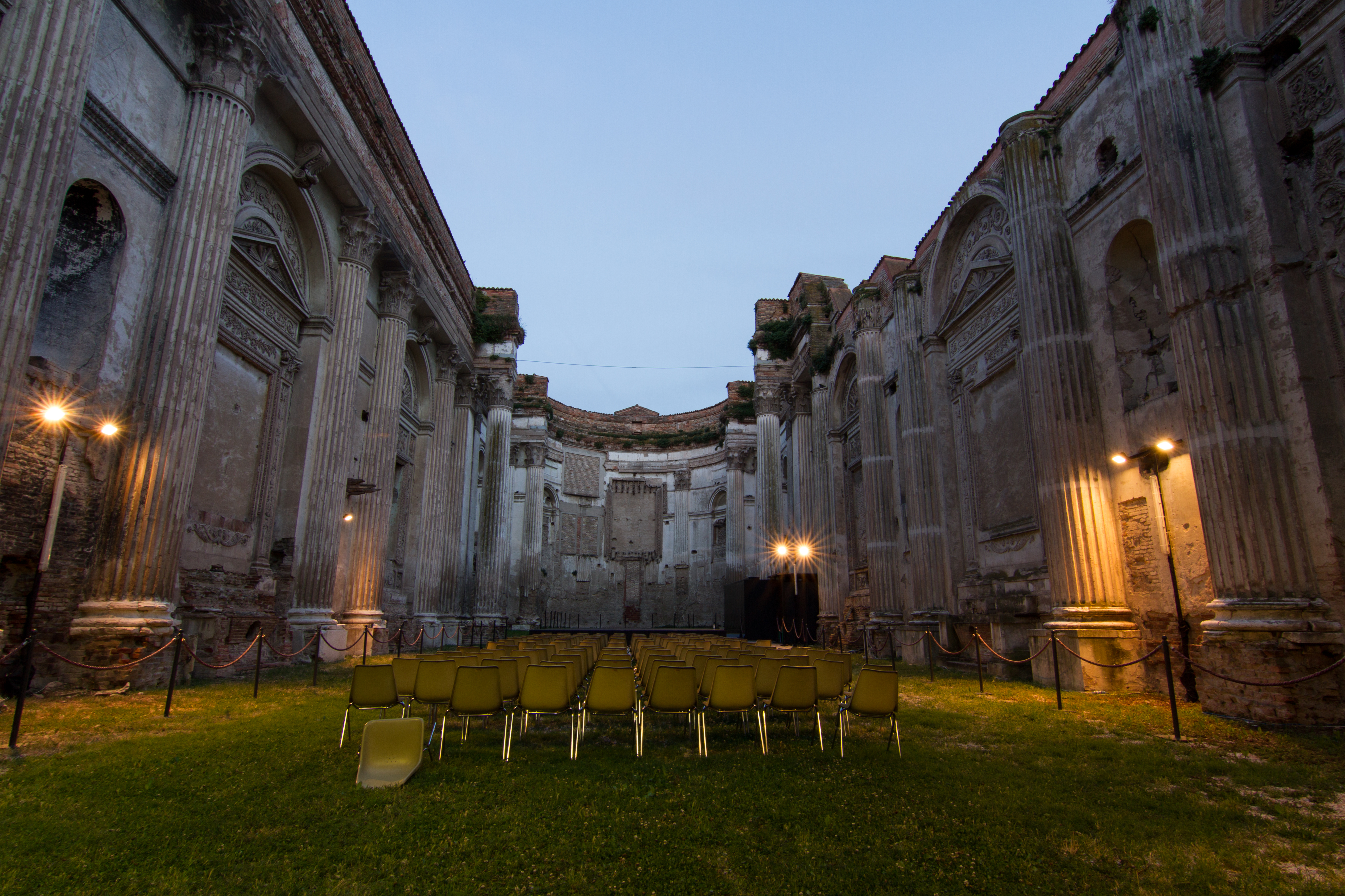 Chiesa di San Francesco (Fano) This is a photo of a monument which is part of cultural heritage of Italy.